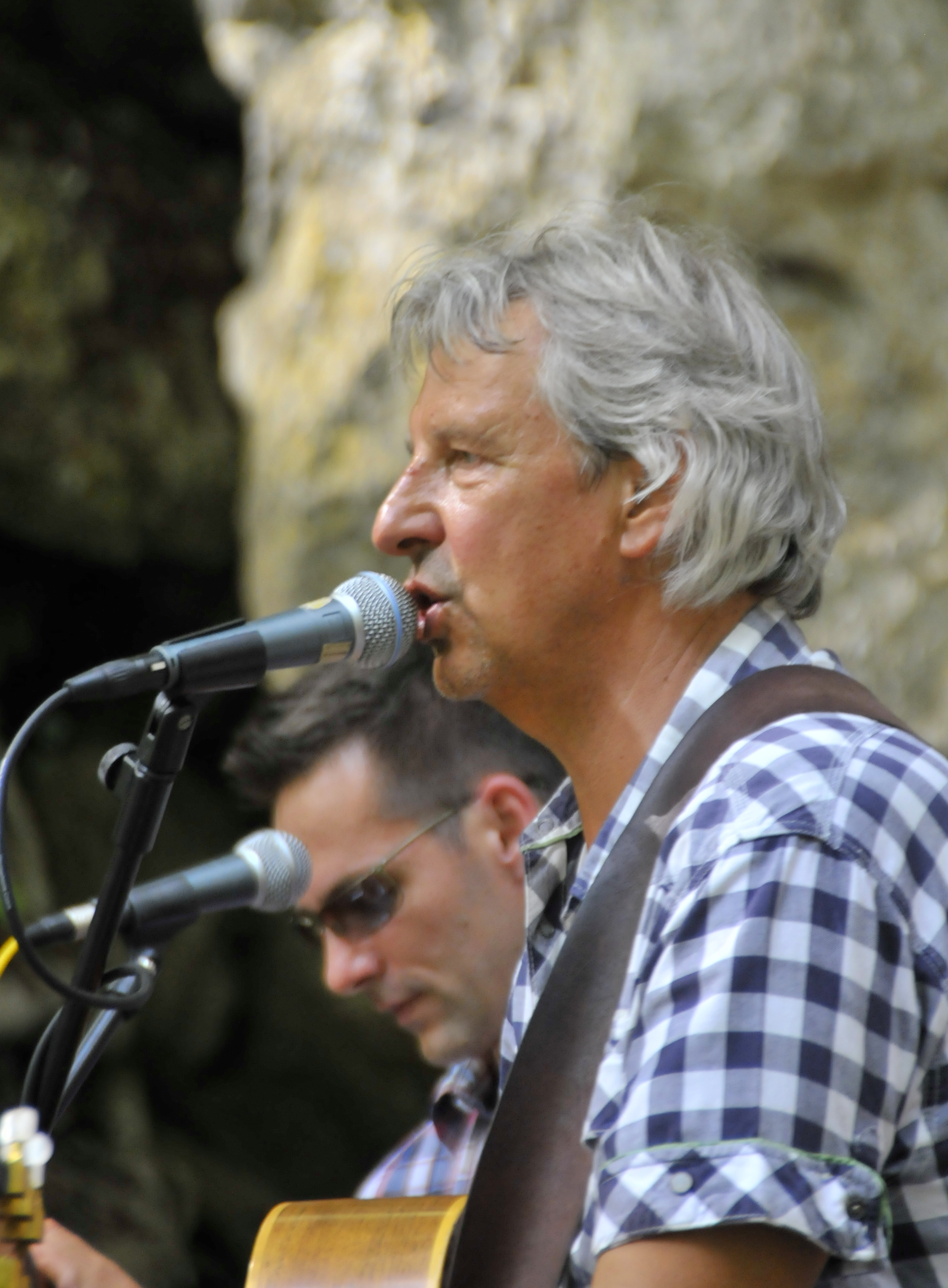 Hochgürtel am 19.8.12 an der Kakushöhle